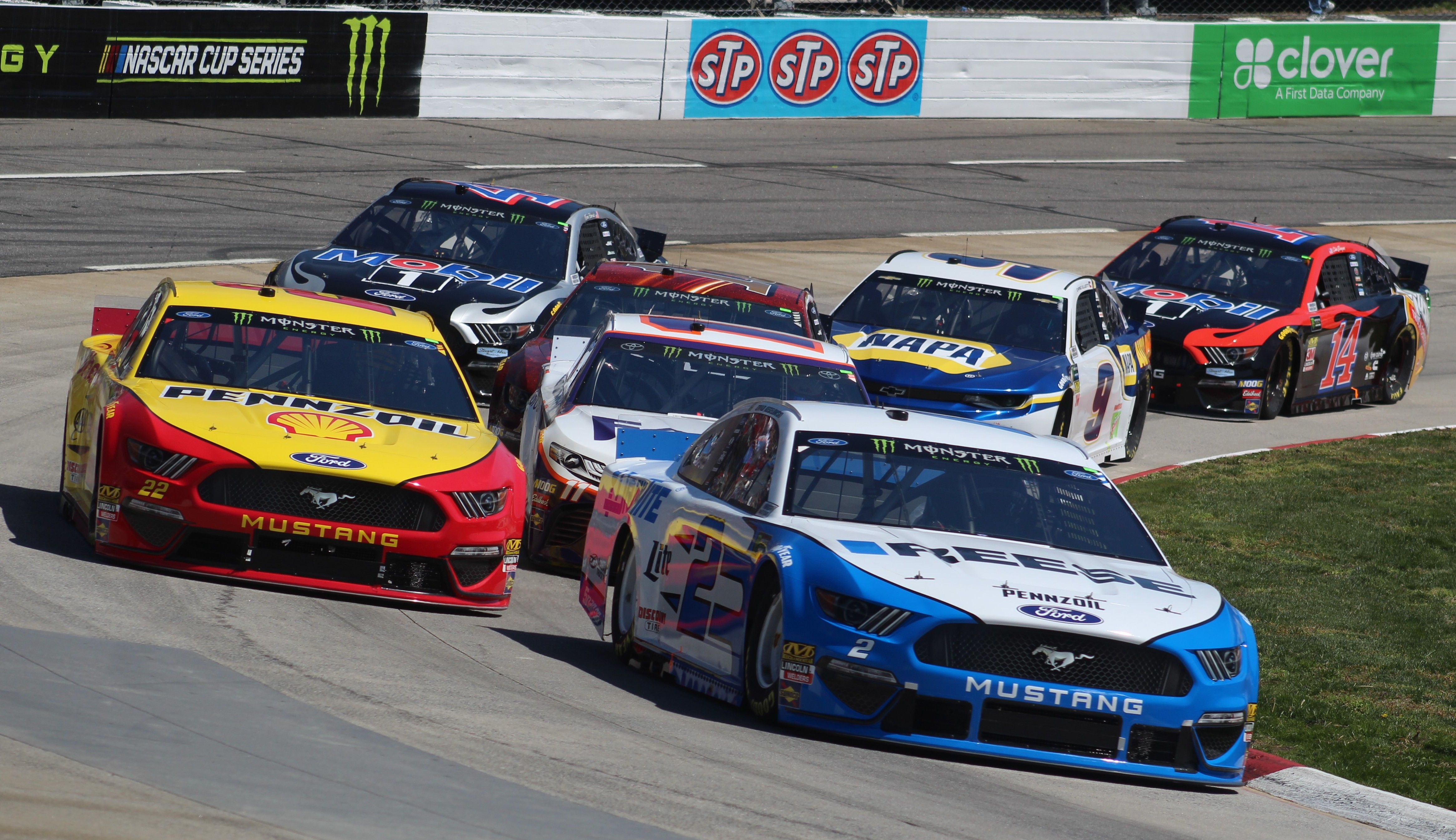 2019 STP 500